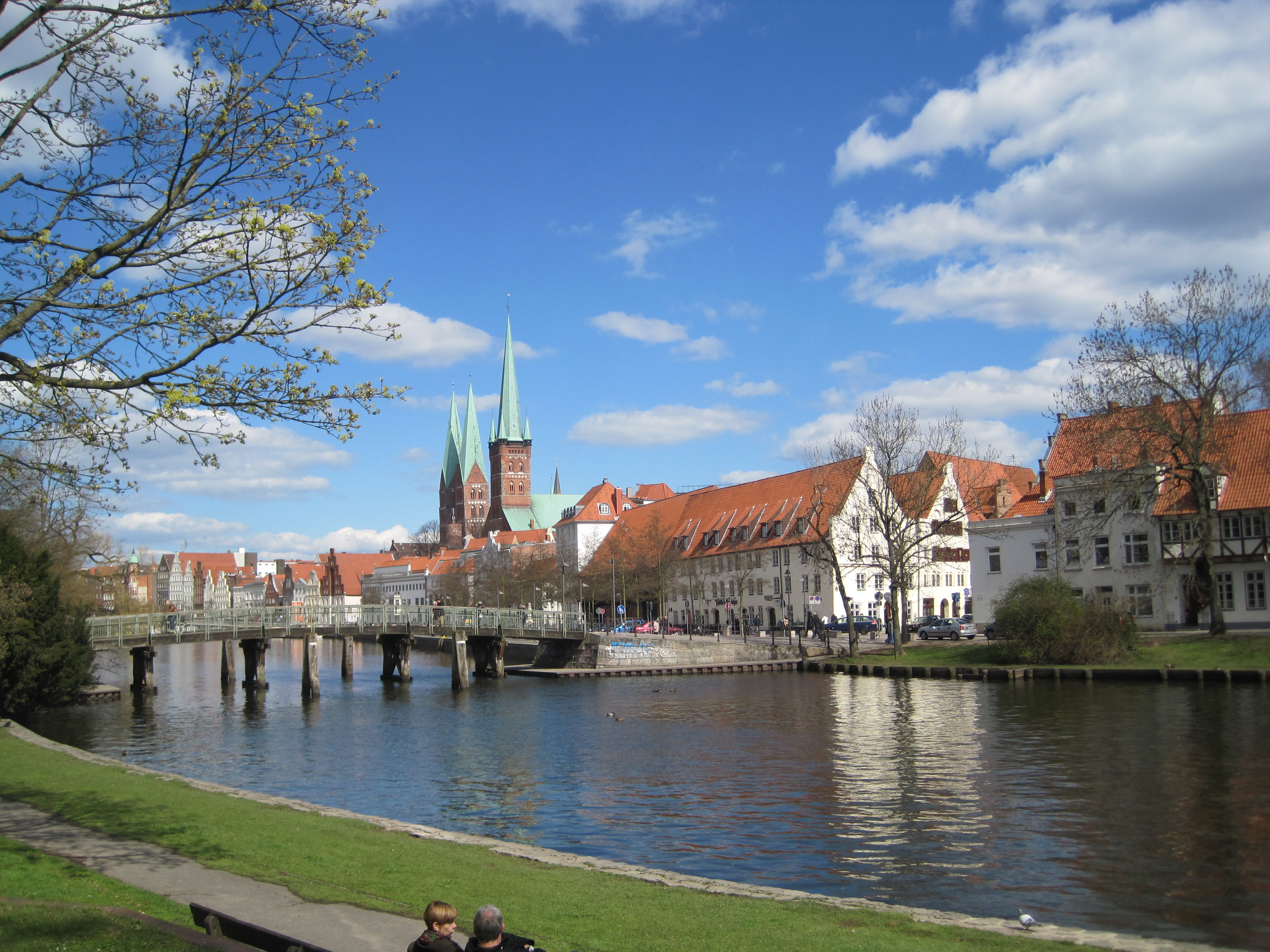 Blick vom Lübecker Malerwinkel auf die Obertrave mit Dankwartsbrücke, im Hintergrund die Türme von St. Petri und St. Marien